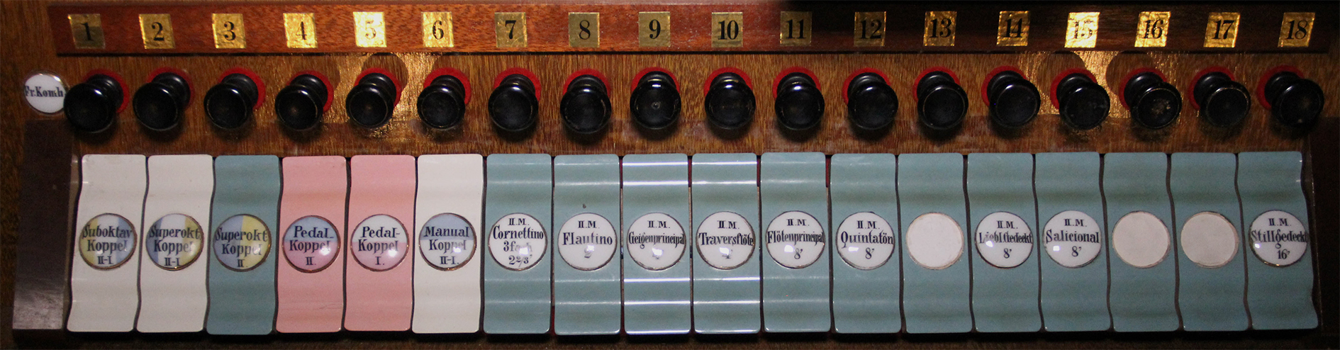 Manubrien der Koppeln und des Schwellwerks am Spieltisch der Strebel-Orgel in der Stadtkirche St. Marien Gräfenthal